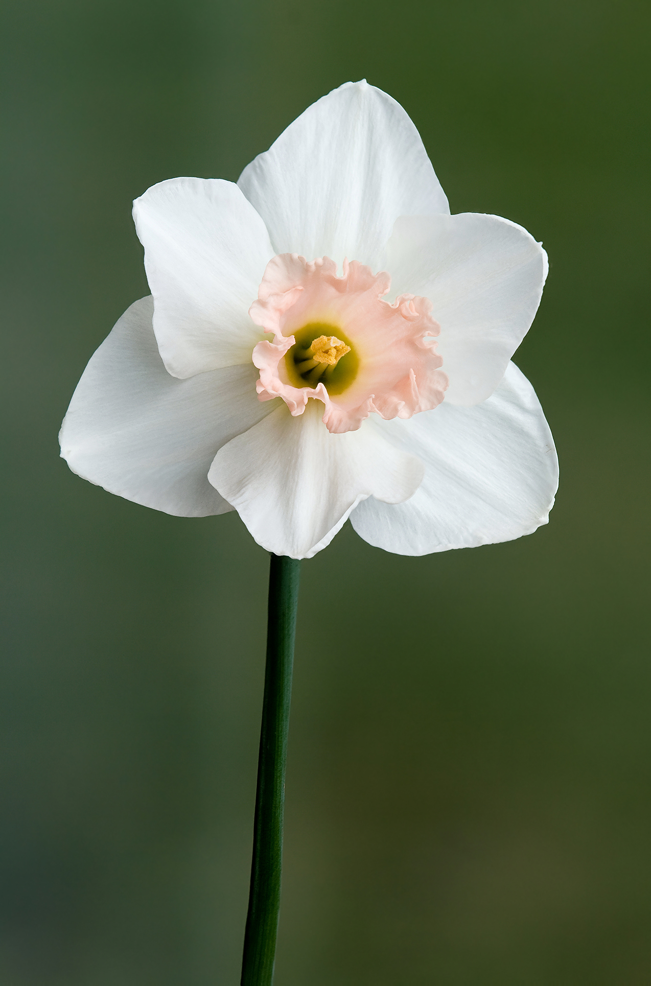 1.2 only